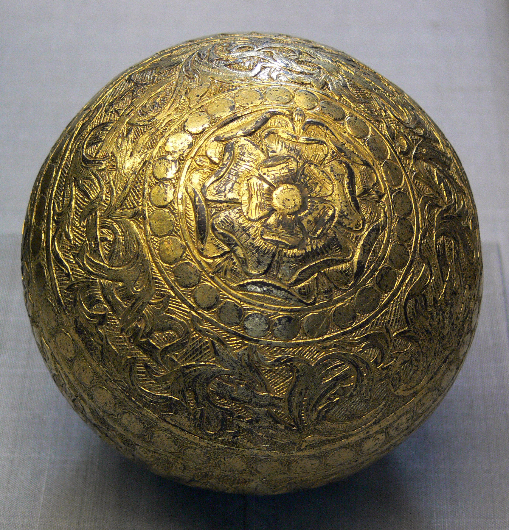 Wärmapfel, Bronze graviert, punziert und vergoldet; Norddeutschland, 2. Hälfte 15. Jh. Kunstgewerbemuseum Berlin, Inv. Nr. F 1668